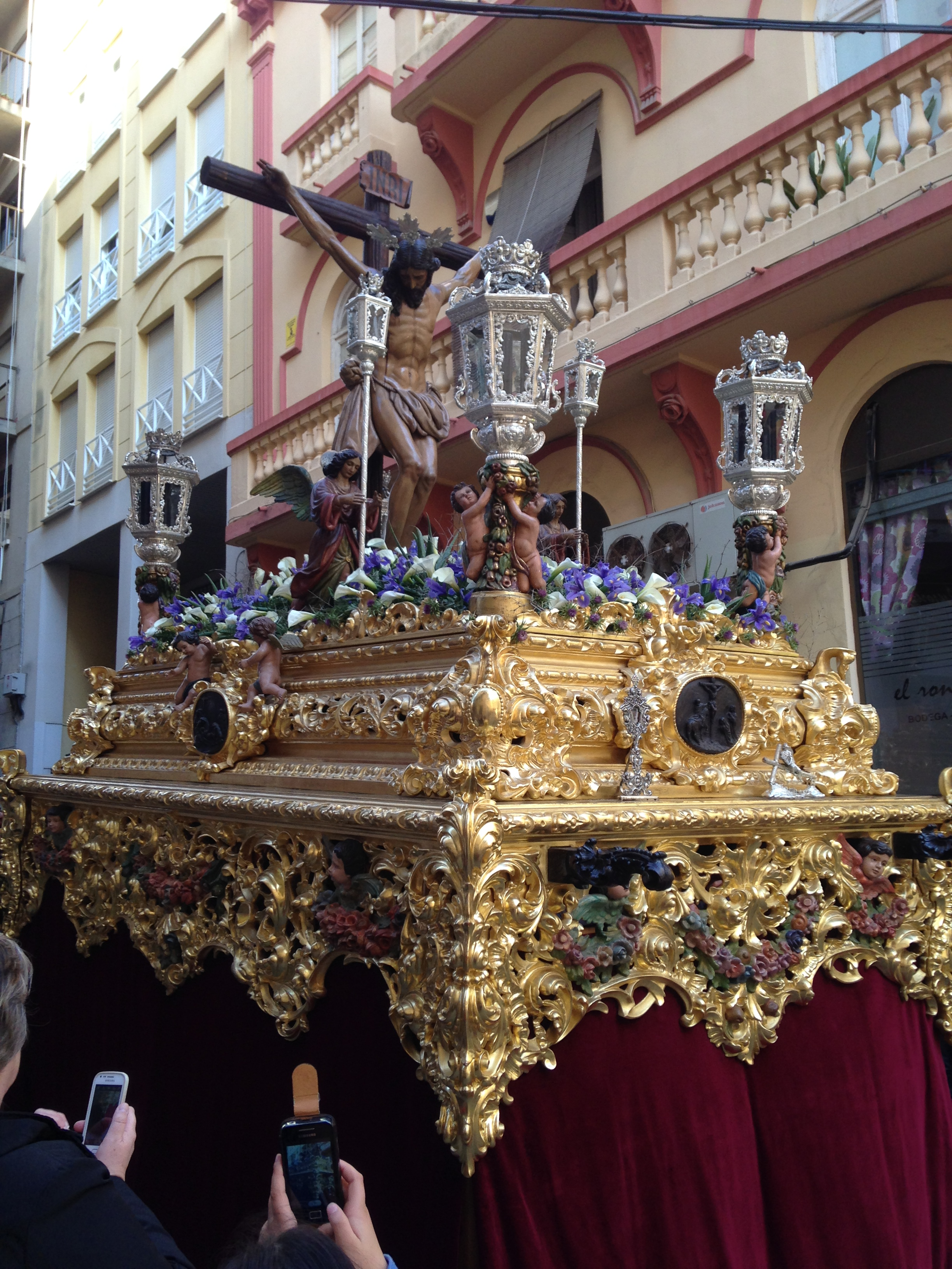 Santísimo Cristo de la Buena Muerte a su paso por la calle Isabel Cabral en Ceuta, España